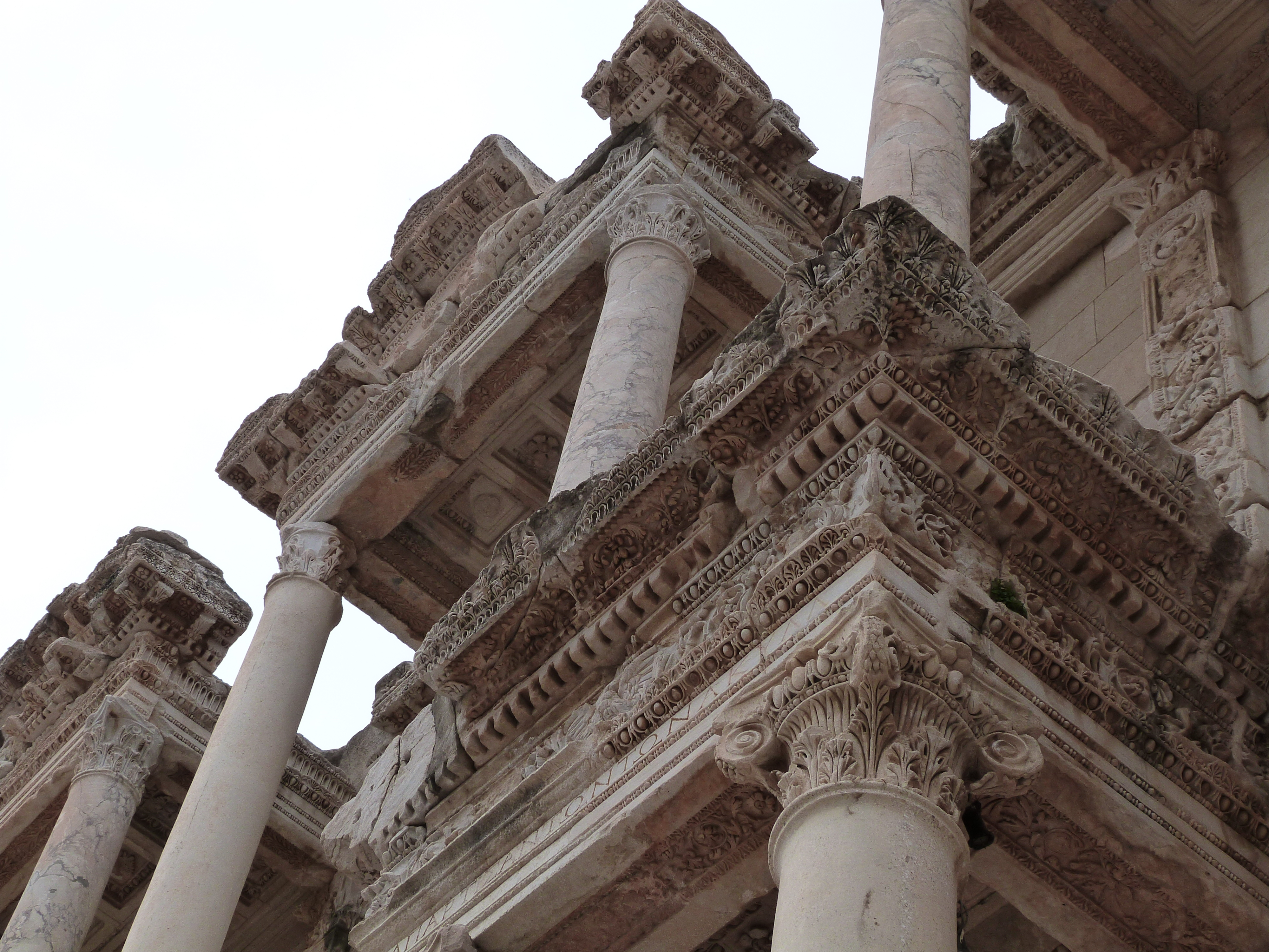 Architraves, frises et corniches couronnent les avancées de la façade de la bibliothèque de Celsus à Ephèse.